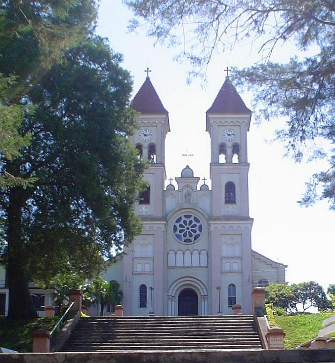 Igreja Católica em Roca Sales, Rio Grande do Sul, Brasil